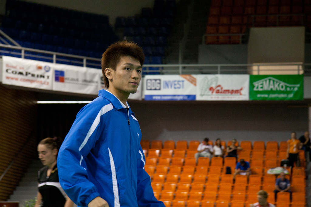 Mezinárodní mistrovství ČR v badmintonu